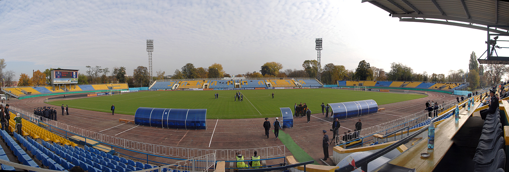 Стадион «Авангард»